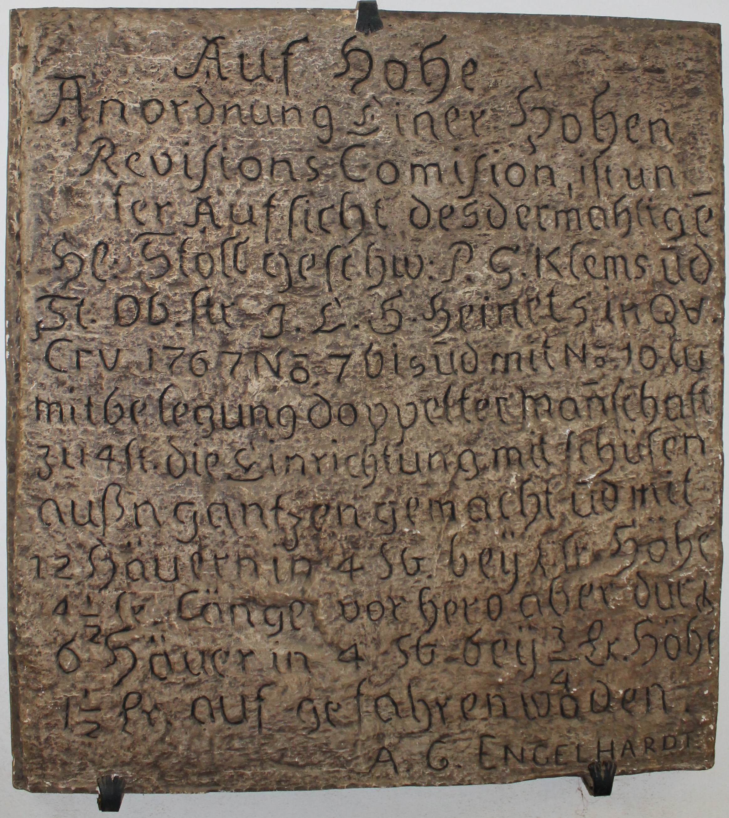 Abguss der sogenannten Schießtafel, einer unter Tage auf dem Elende Seelen Spat im Feld der Grube „Alte Elisabeth“ geschlägelten Tafel. Ausgestellt über Tage im Schachgebäude der Reichen Zeche, Freiberg, Sachsen, Deutschland. „Auf Hohe Anordnung einer Hohen Revisionskommission ist unter Aufsicht der dermaligen Herren Stollngeschworenen P.G. Klems und Stollnobersteiger J.C.H. Heinets im Quartal Crucis 1767 Woche Nr. 7 bis einschließlich Nr. 10 mit Belegung doppelter Mannschaft zu 4 Schichten die Einrichtung mit Schüssen aus dem Ganzen gemacht und mit 12 Häuern in 4 S.G. beÿ 1 lr. Höhe 4 ½ lr. länge vorhero aber durch 6 Häuer in 4 SG beÿ ¾ Lr. Höhe 1 ½ Lr. auf gefahren woden. A.C. ENGELHARDT.“